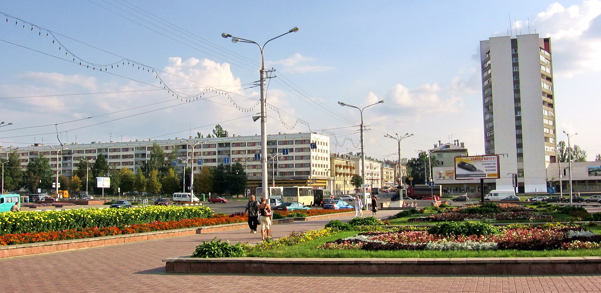 Panorama